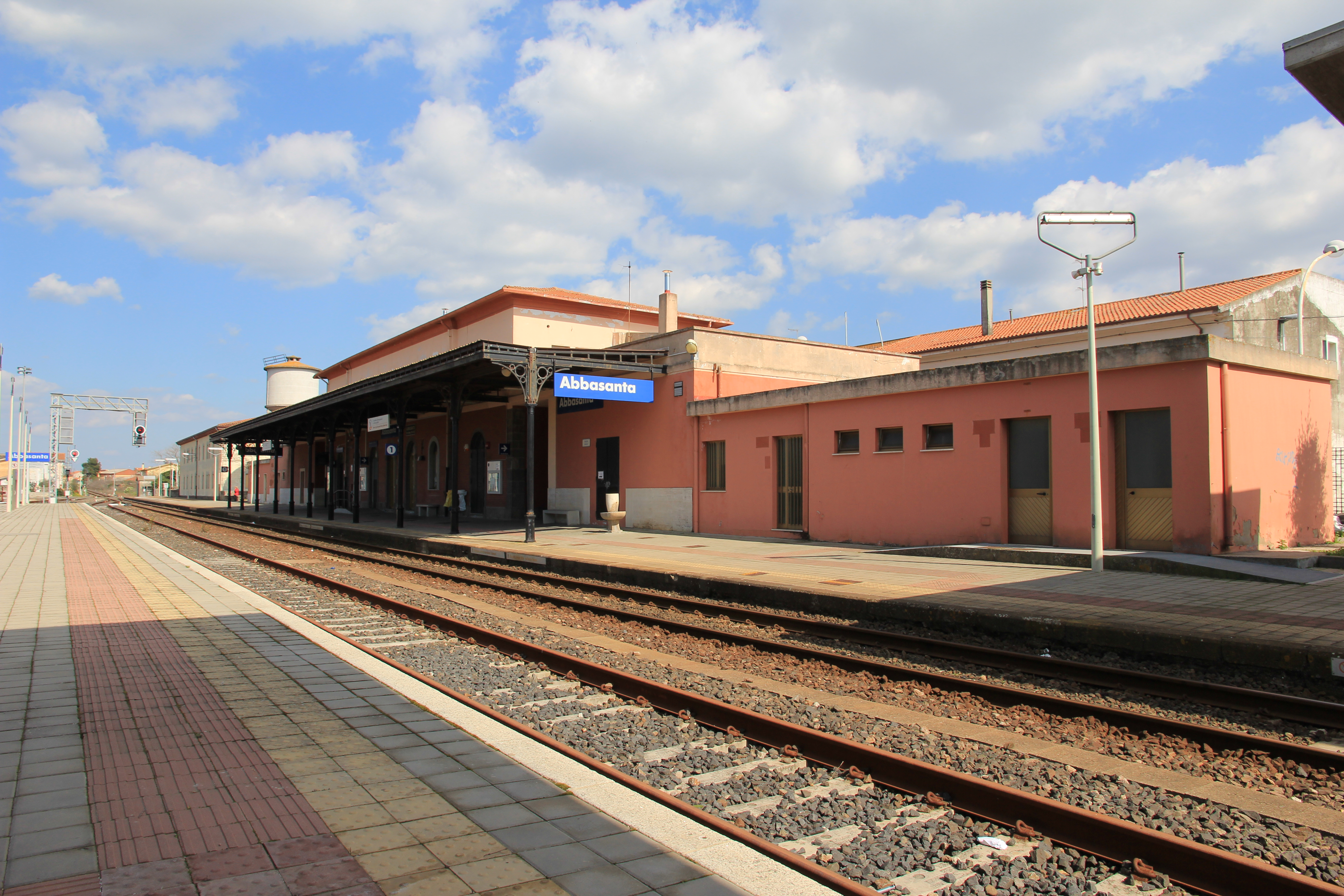 Abbasanta - Stazione ferroviaria